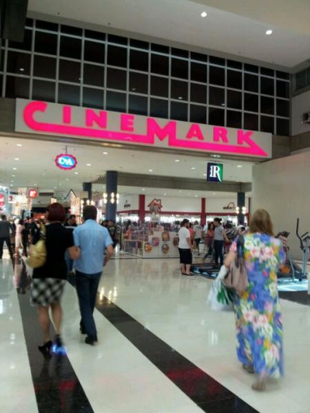 Vista da entrada do Cinemark Central Plaza, de São Paulo SP